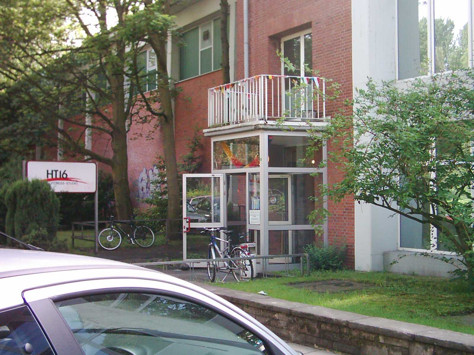 HT 1816 Sportsudio